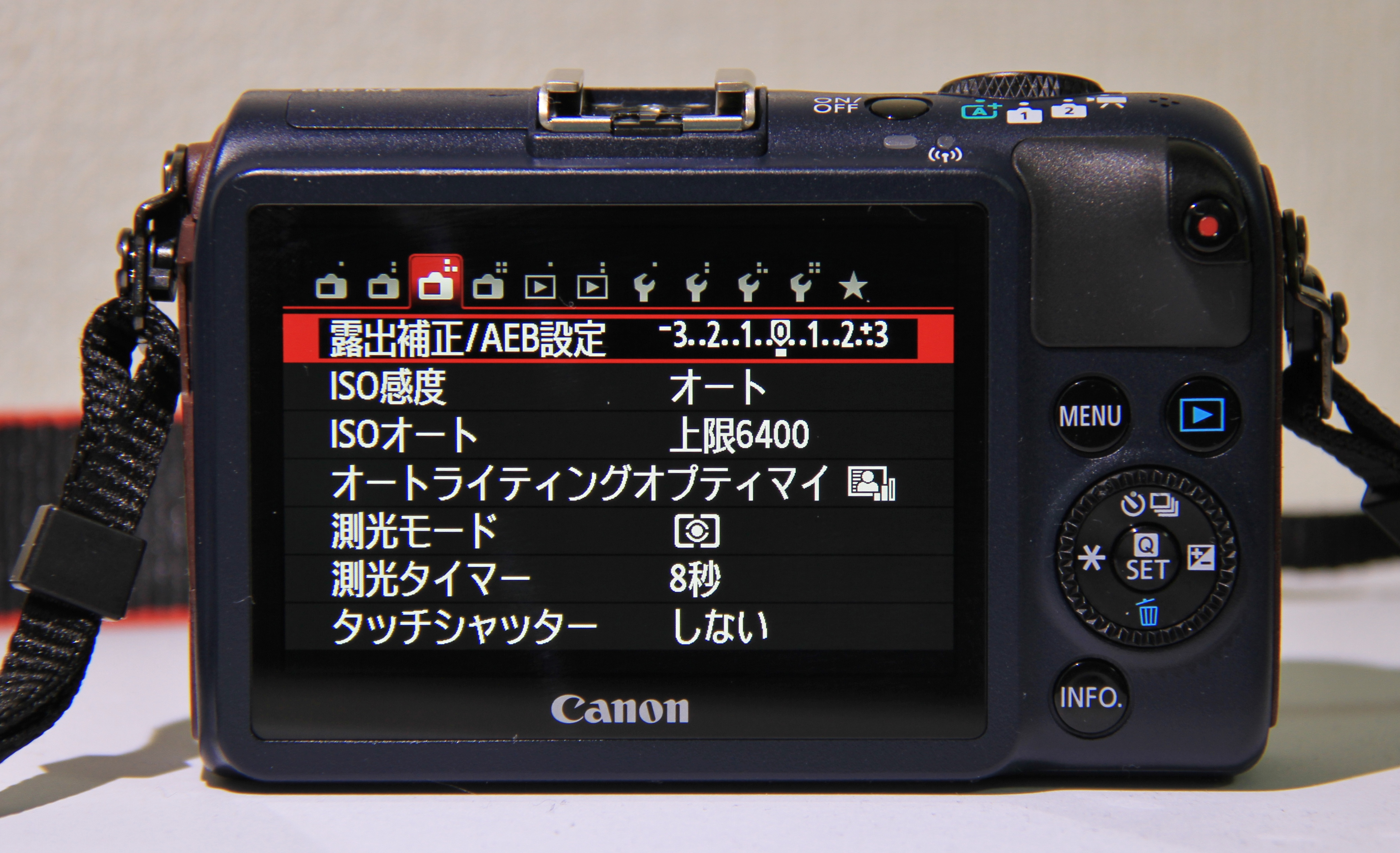 Canon EOS M2